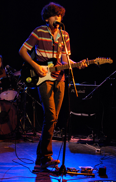 José Miguel del Pópolo tocando en vivo en 2010.